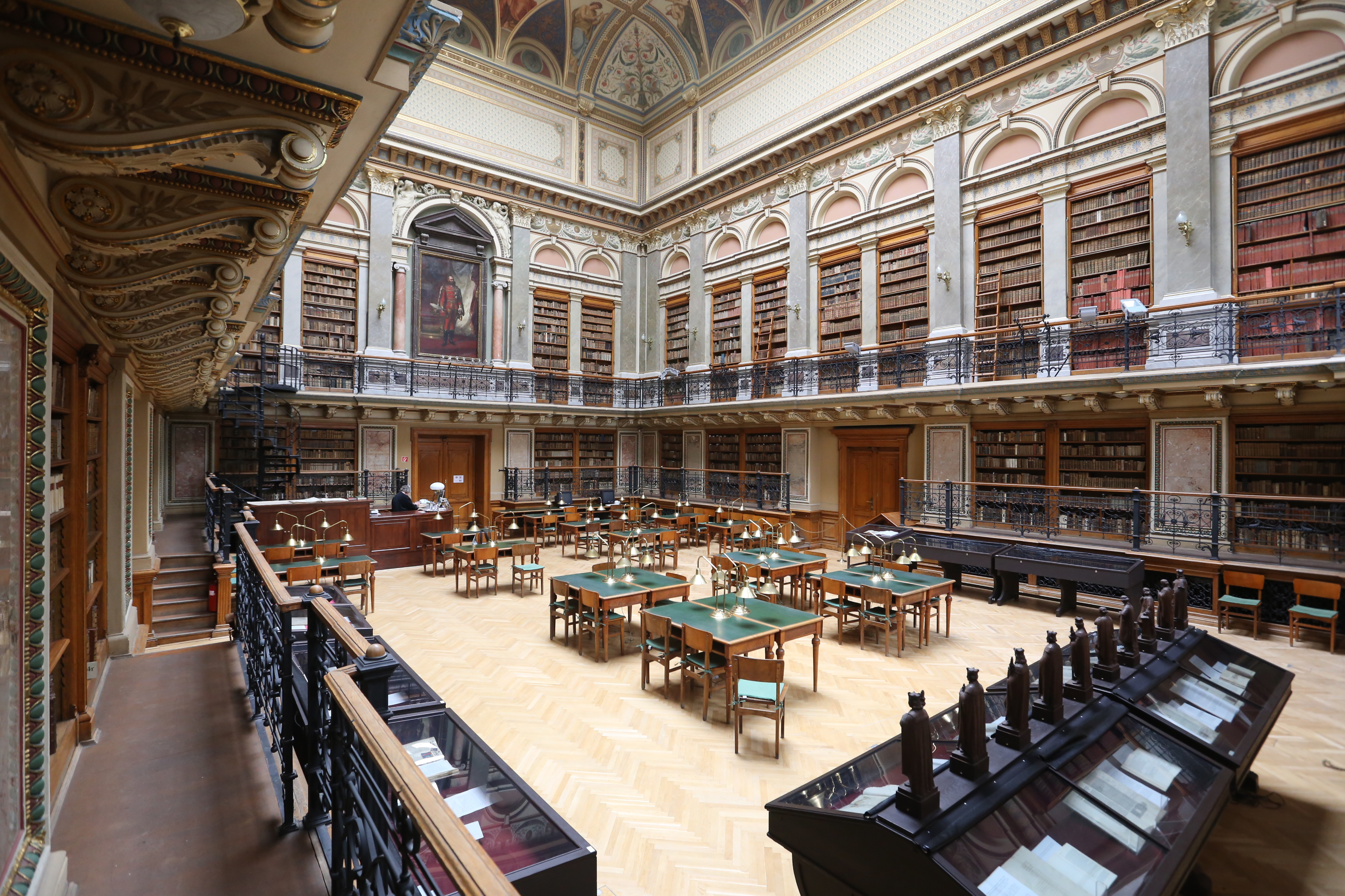 Egyetemi Könyvtár This is a photo of a monument in Hungary. Identifier: 466